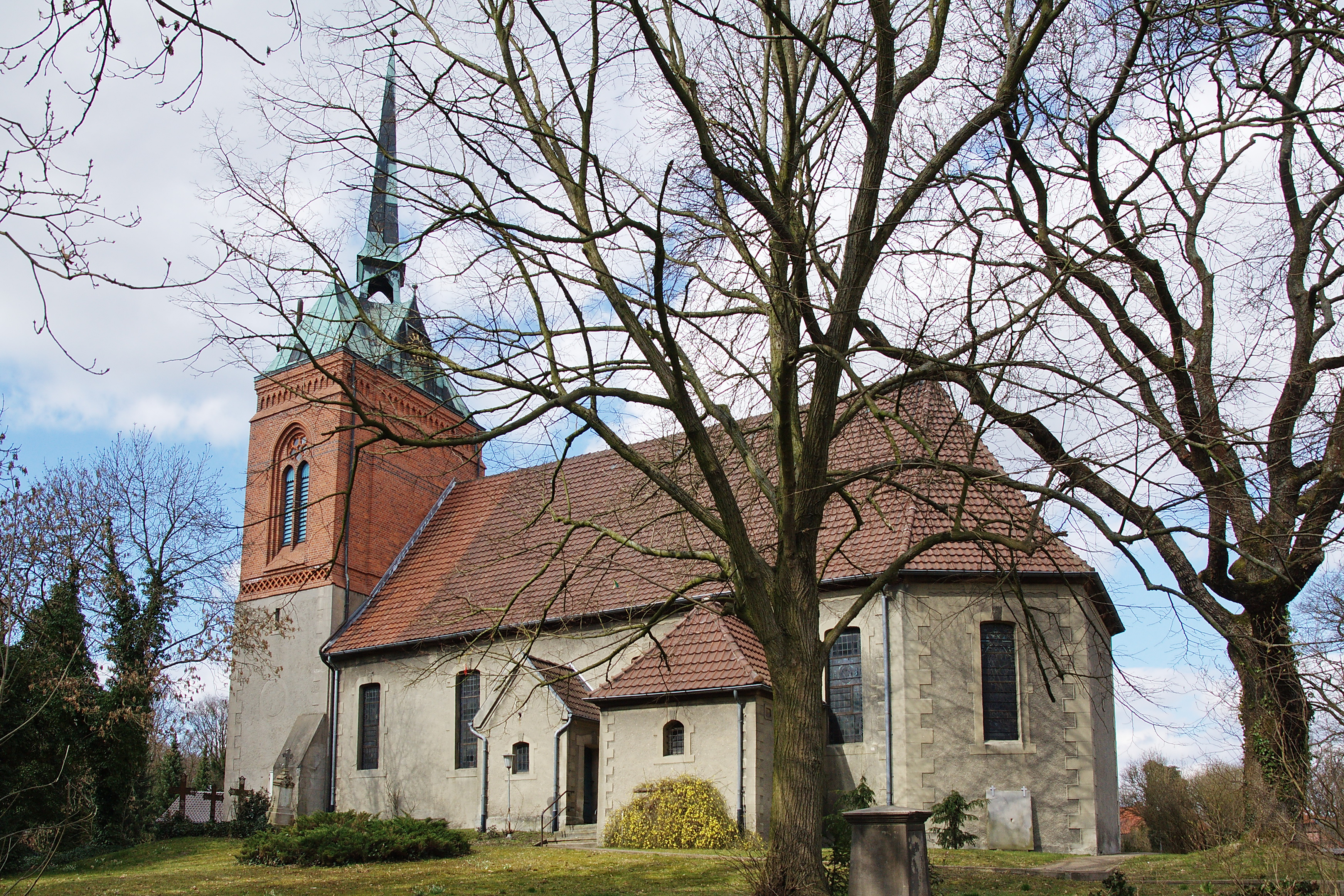 Marienkirche in Päse (Meinersen), Niedersachsen, Deutschland